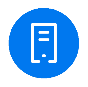 Logo Des Open Enterprise Servers